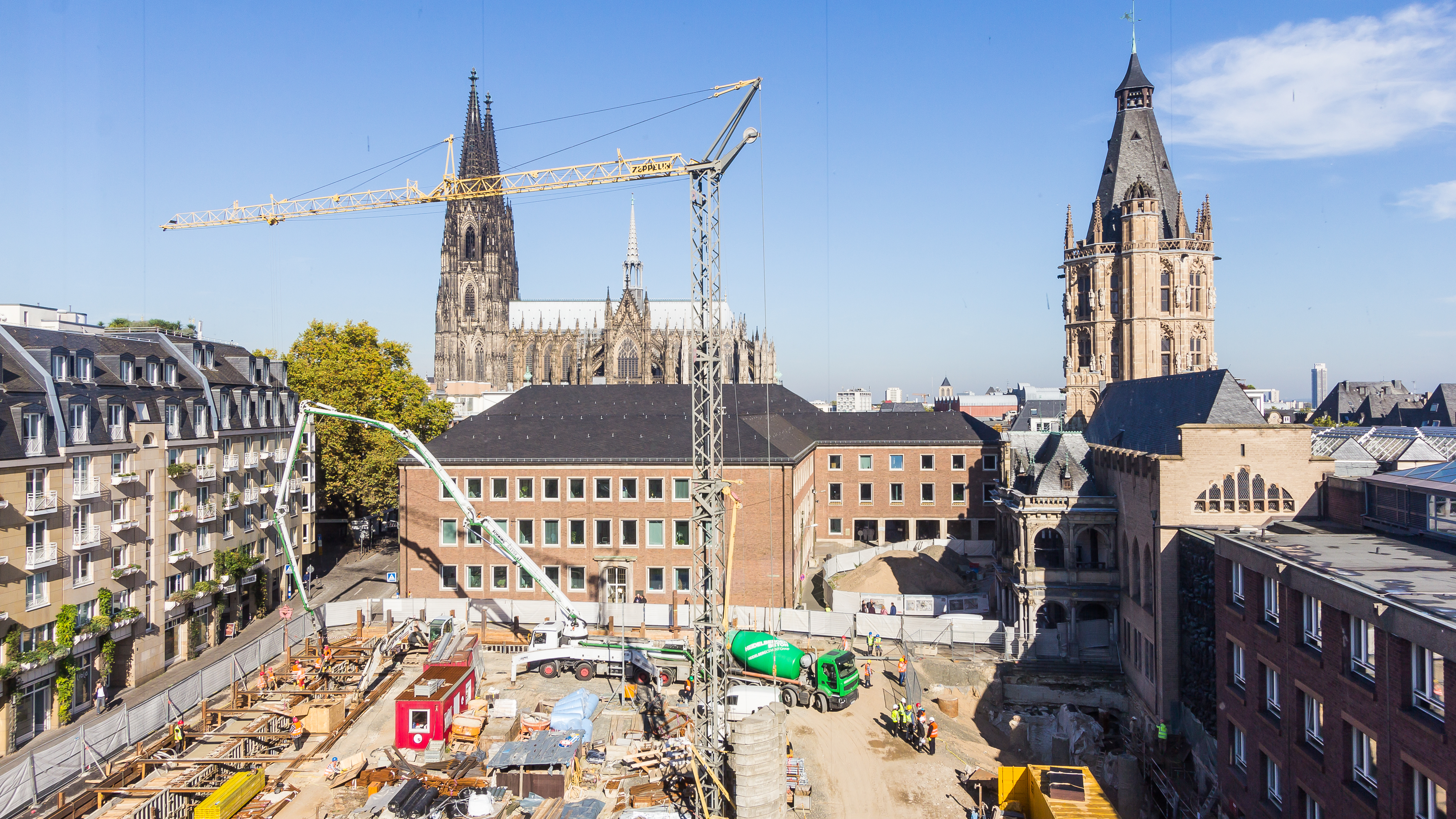 Betonage des Sporn für das MiQua Foto: Blick herunter vom Museum Wallraf auf die Baustelle mit der Betonpumpe